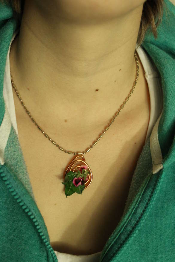 floristická přízdoba na krk